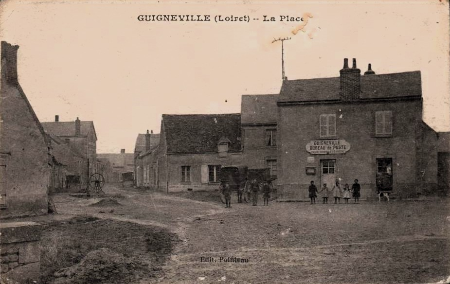 La place de Guigneville sur une carte postale ancienne, village de la région naturelle de Beauce, Loiret, France